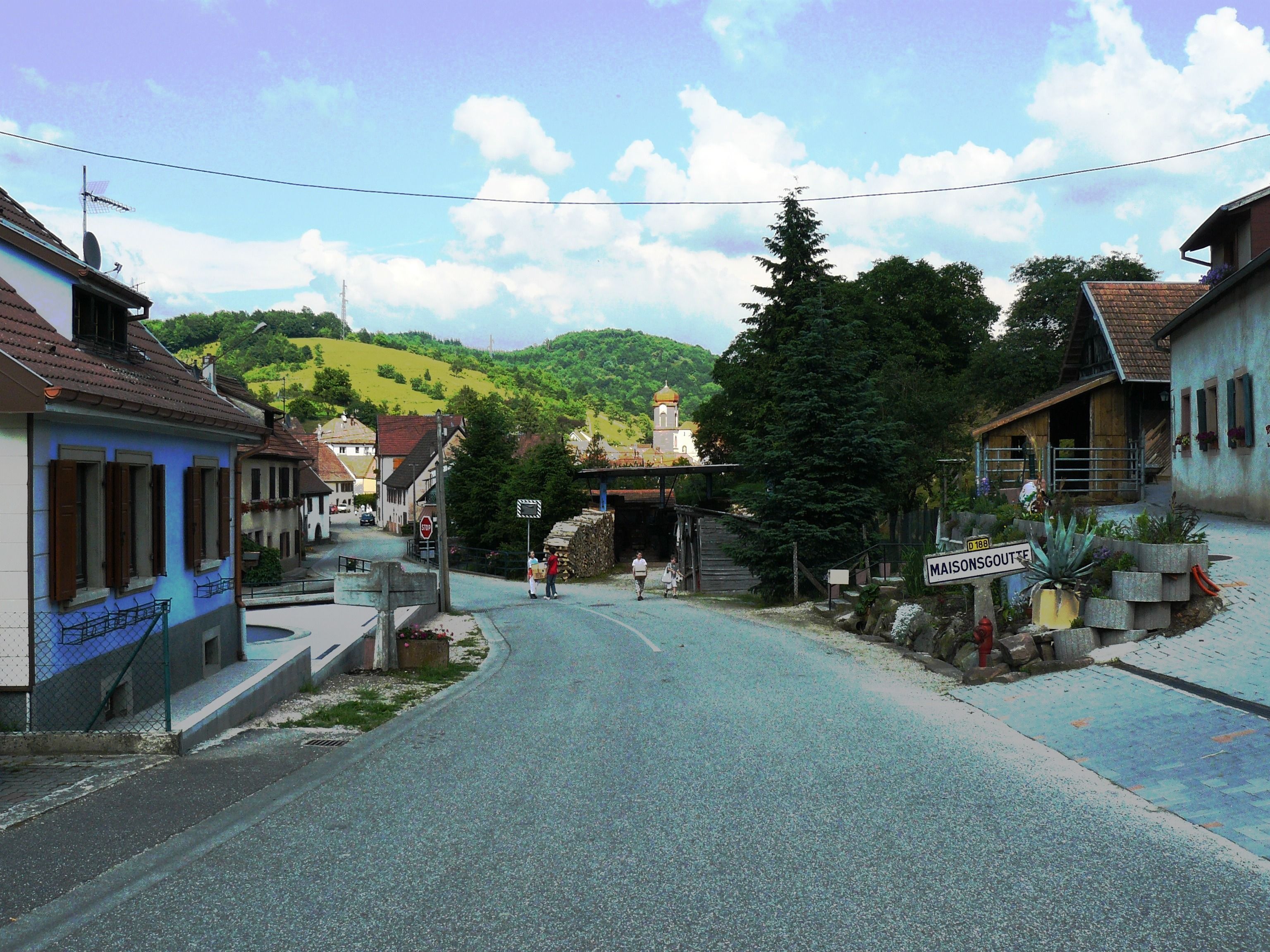 Entrée du village de Maisonsgoutte